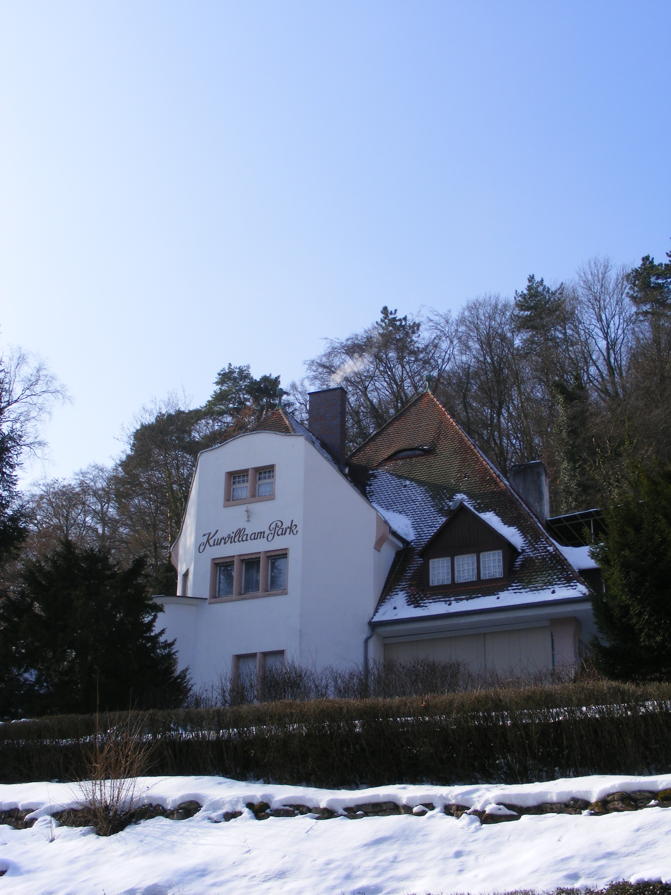 Hotel-Pension "Kurvilla am Park", Bismarckstr. 46, 97688 Bad Kissingen (Außenansicht, frontal).